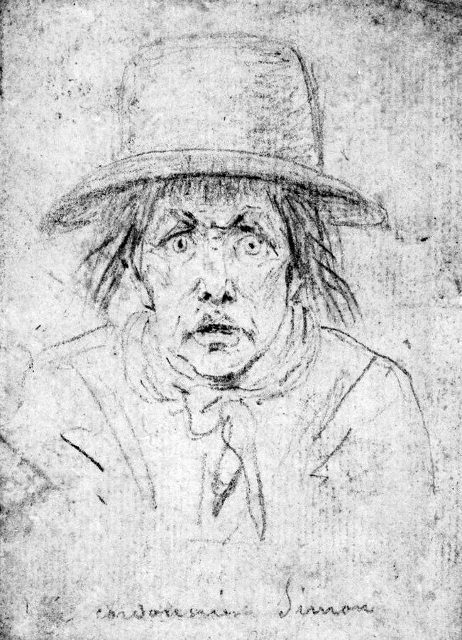 Croquis d'Antoine Simon (1736-1794).